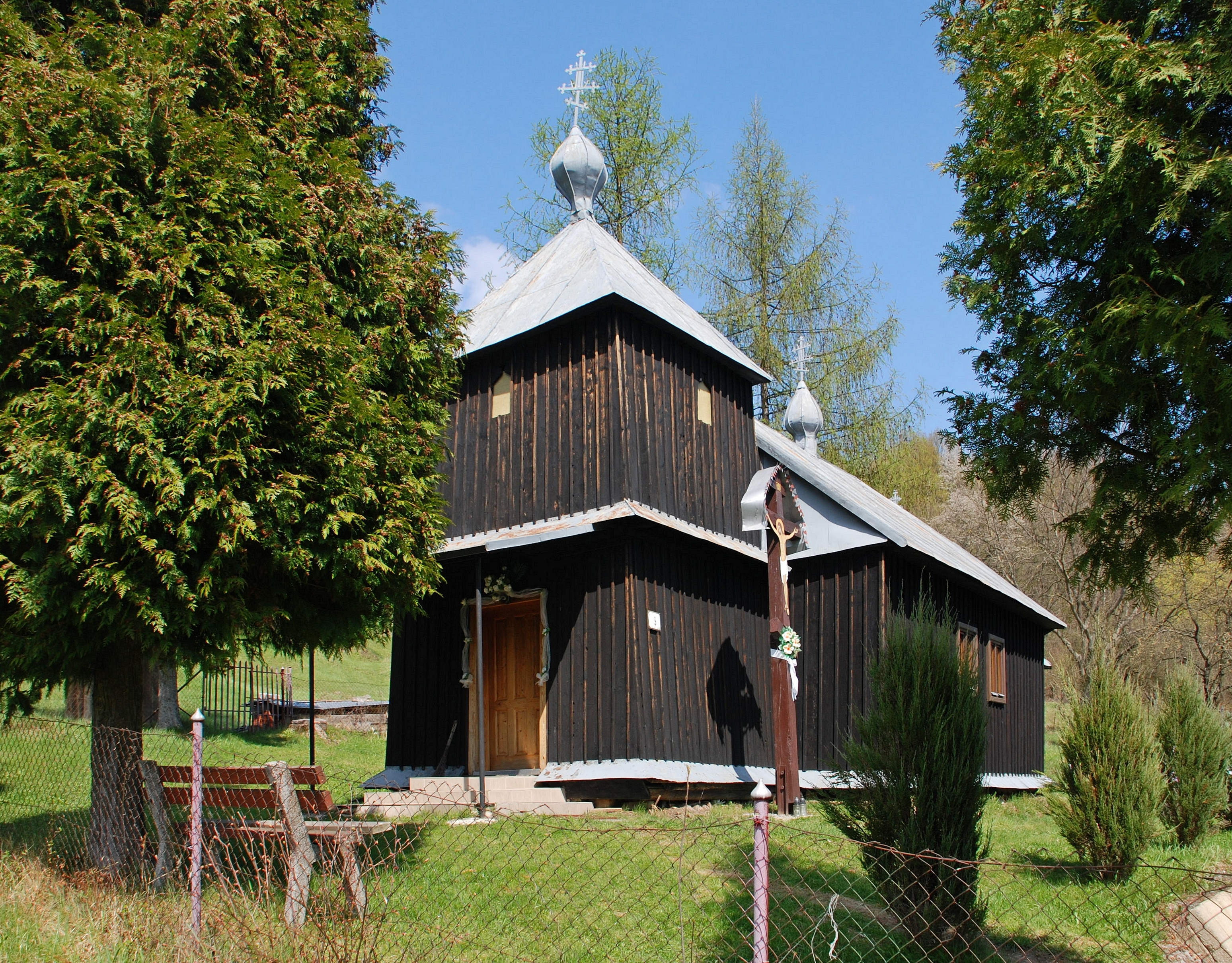 wieś Krajné Čierno